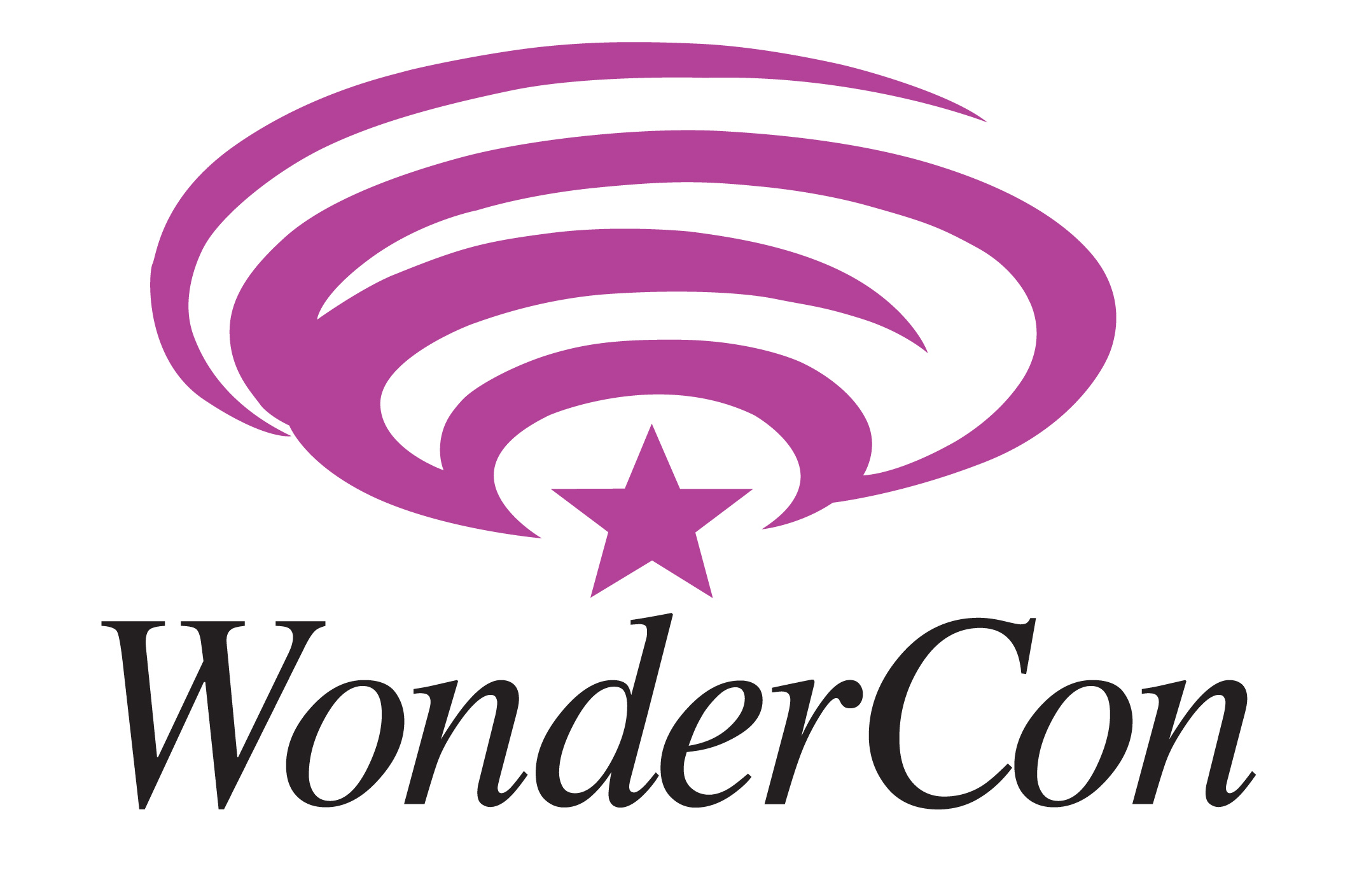 Logo von